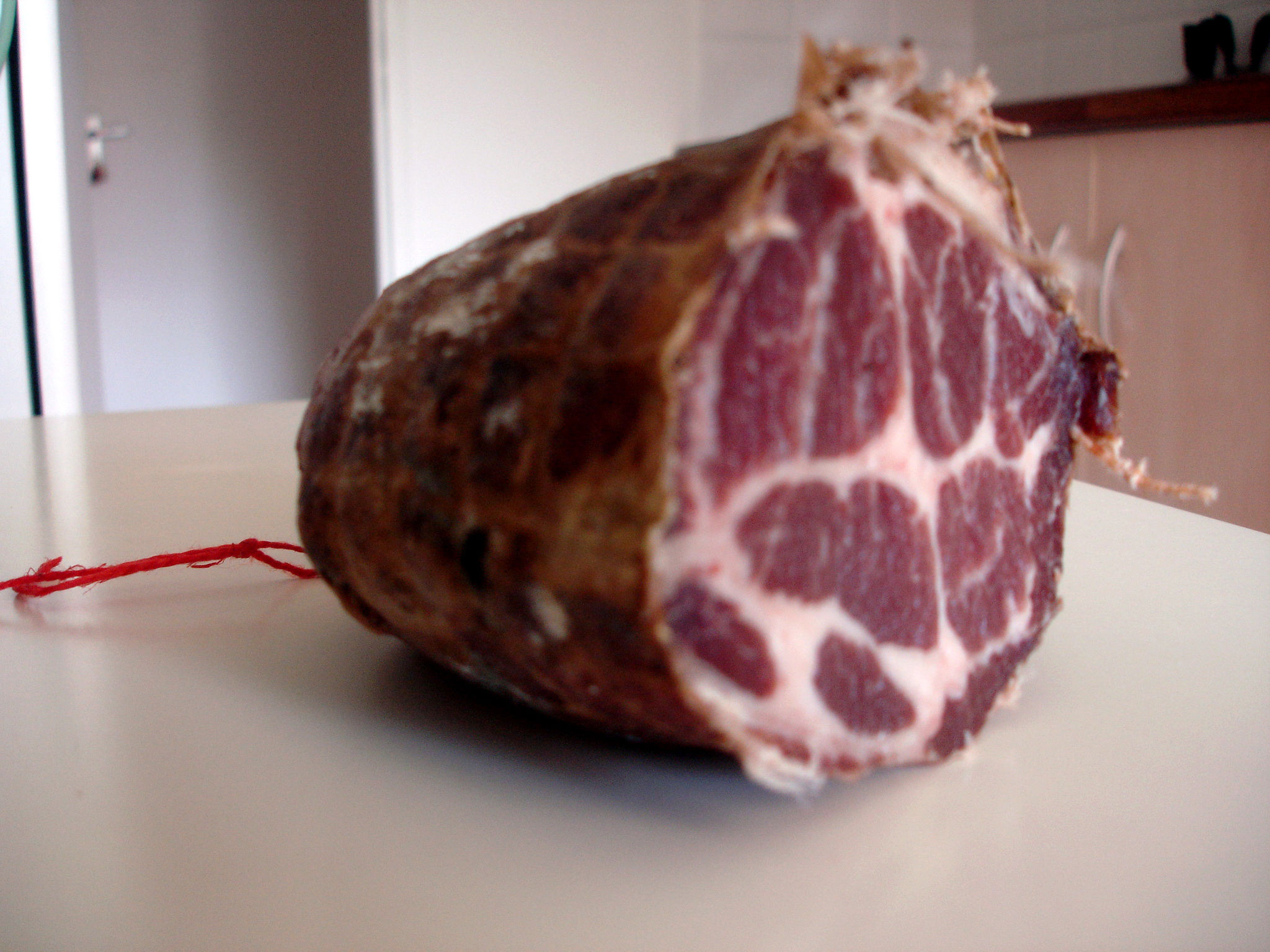 Coppa, charcuterie corse